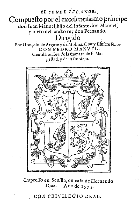 Portada de la edición de Gonzalo Argote de Molina de El conde Lucanor, escrita por el célebre magnate Don Juan Manuel (1282-1348), hijo del infante Manuel de Castilla y nieto del rey Fernando III el Santo. Impresa en Sevilla por Fernando Díaz en 1575.